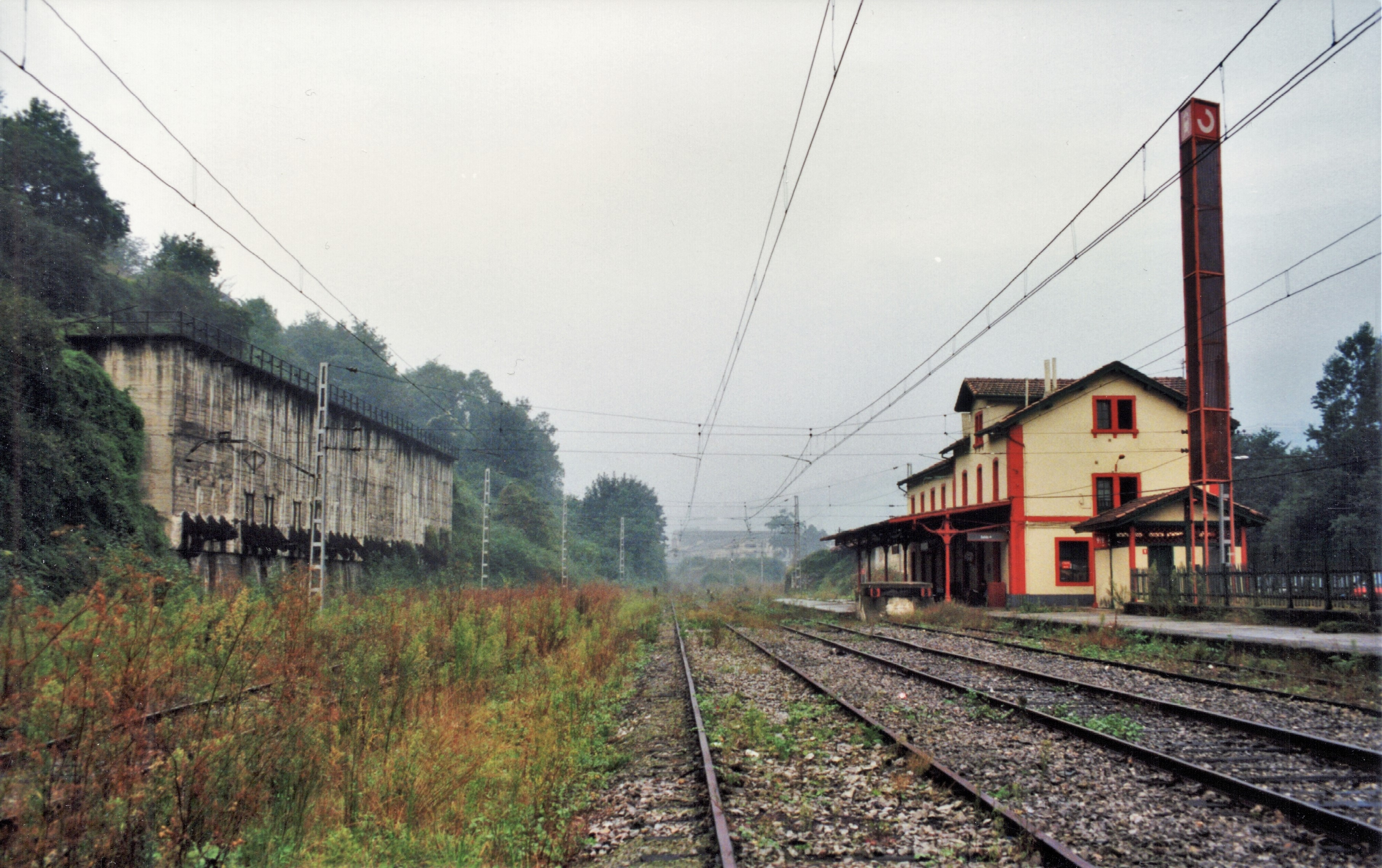 Estación de Renfe de Trubia en septiembre de 1996, unos meses antes de su cierre en junio de 1997.